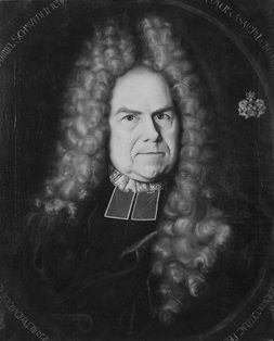 Gabriel Schweder, Gemälde in der Tübinger Professorengalerie